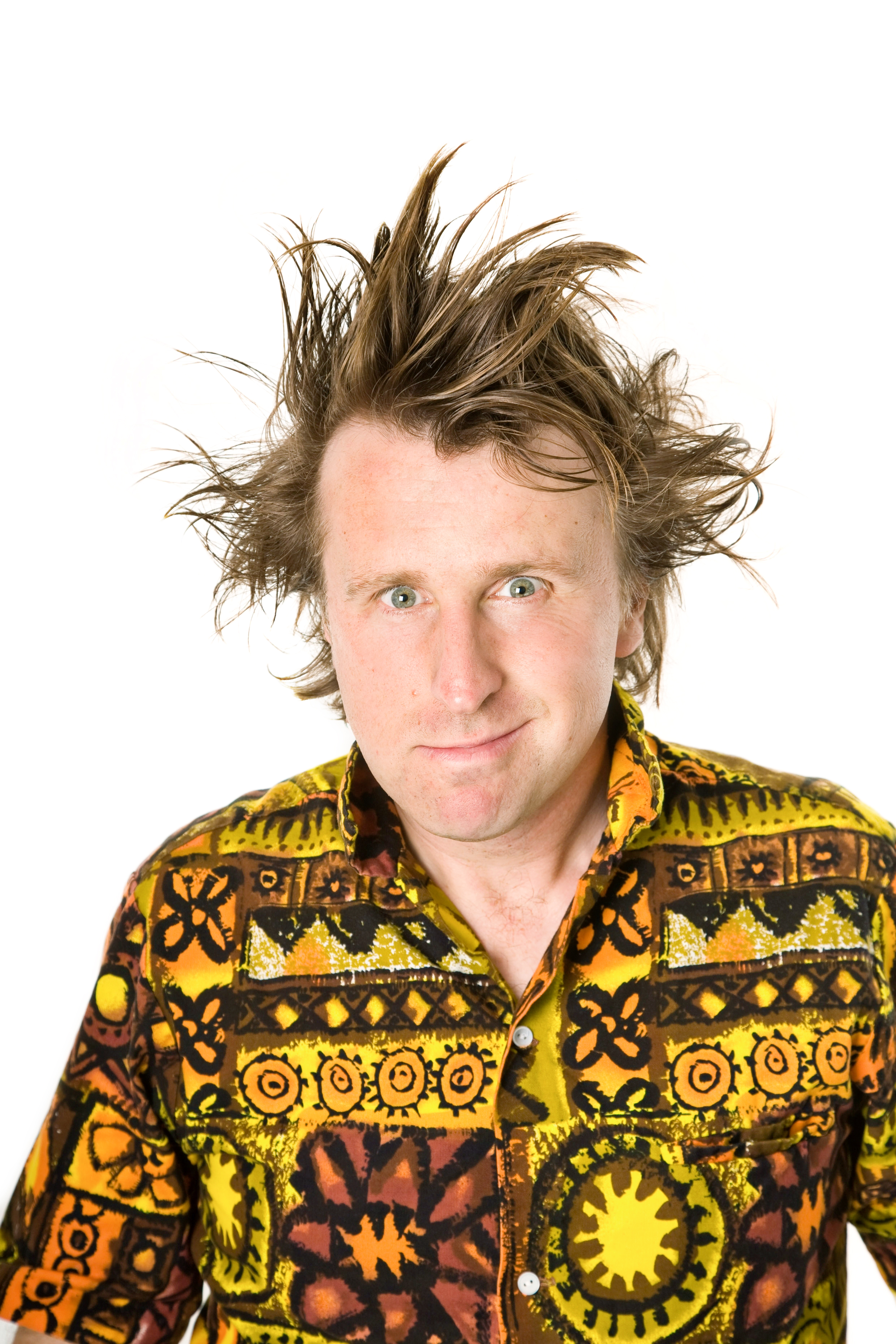 Milton Jones